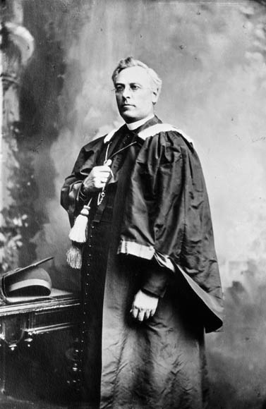 L'abbé Raymond Casgrain, 1831-1904